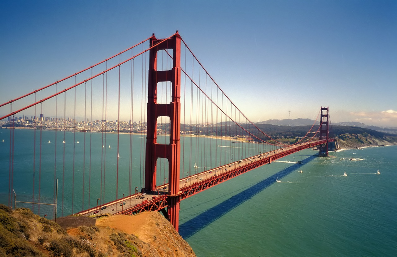 A Golden Gate híd San Franciscóban. Az eredeti kép zajszűrés után.